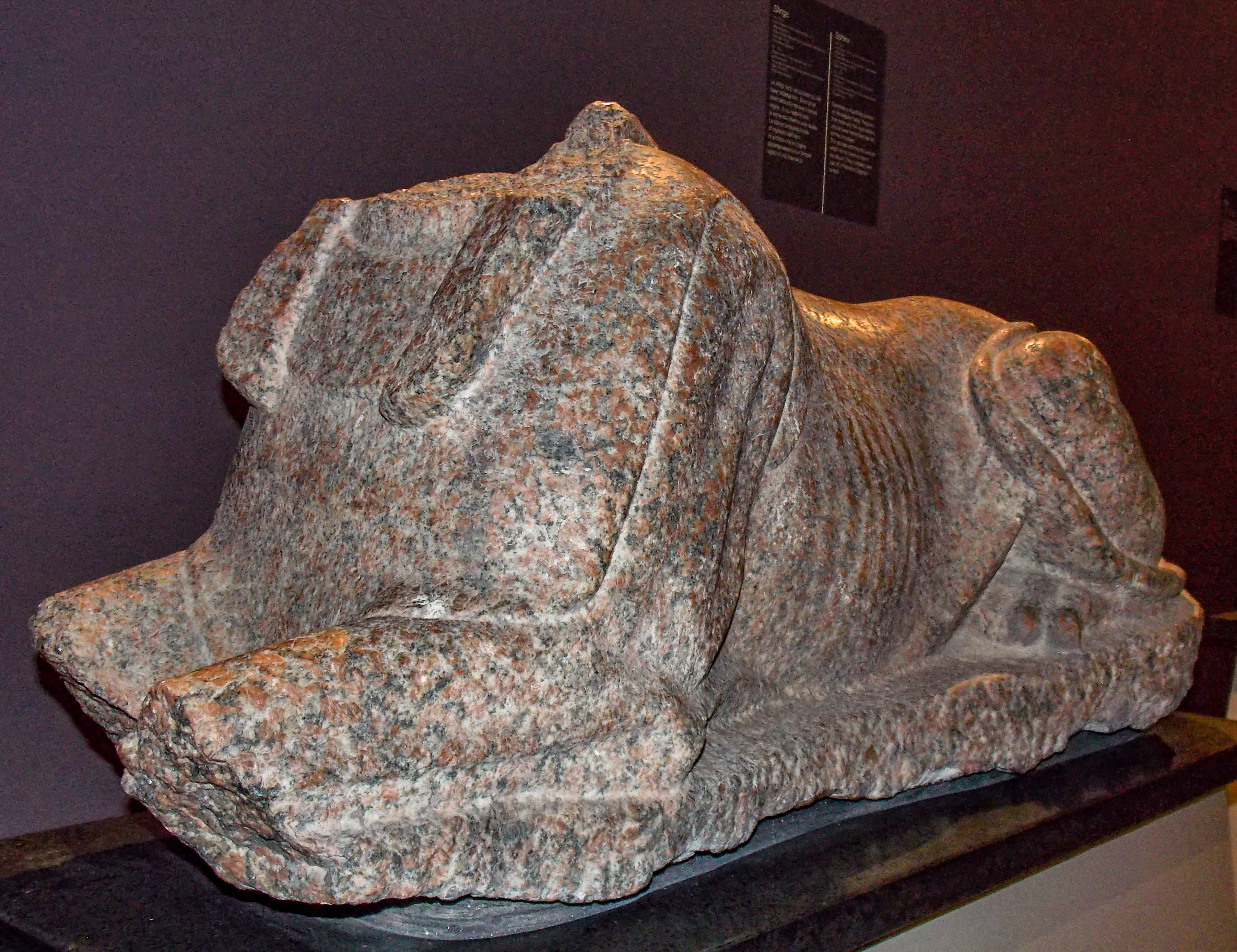 Un reperto del tempio di Iside di Benevento conservato nella sezione egizia del Museo del Sannio, presso il museo ARCOS: sfinge tolemaica.